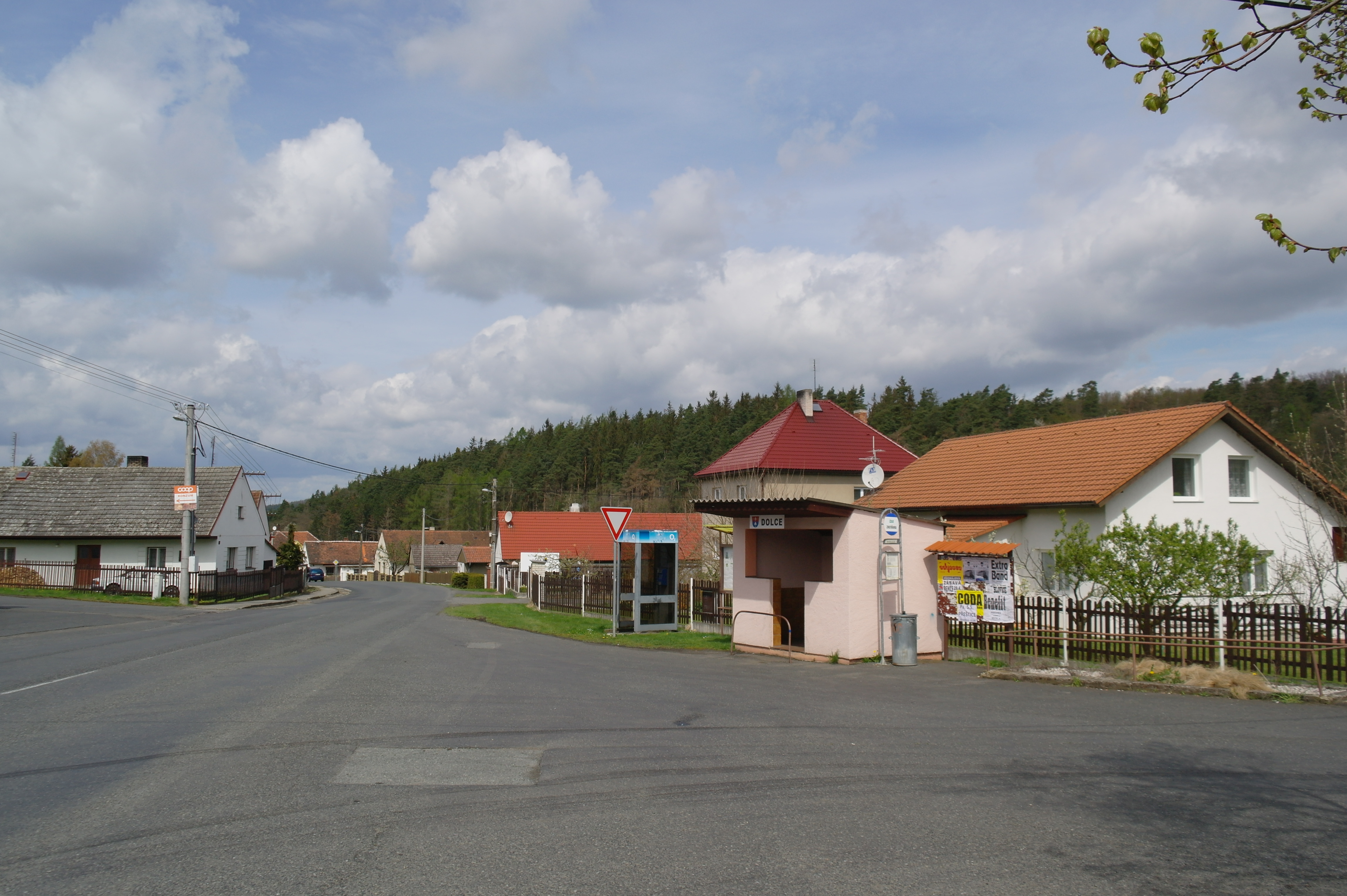 Dolce, severní část návsi